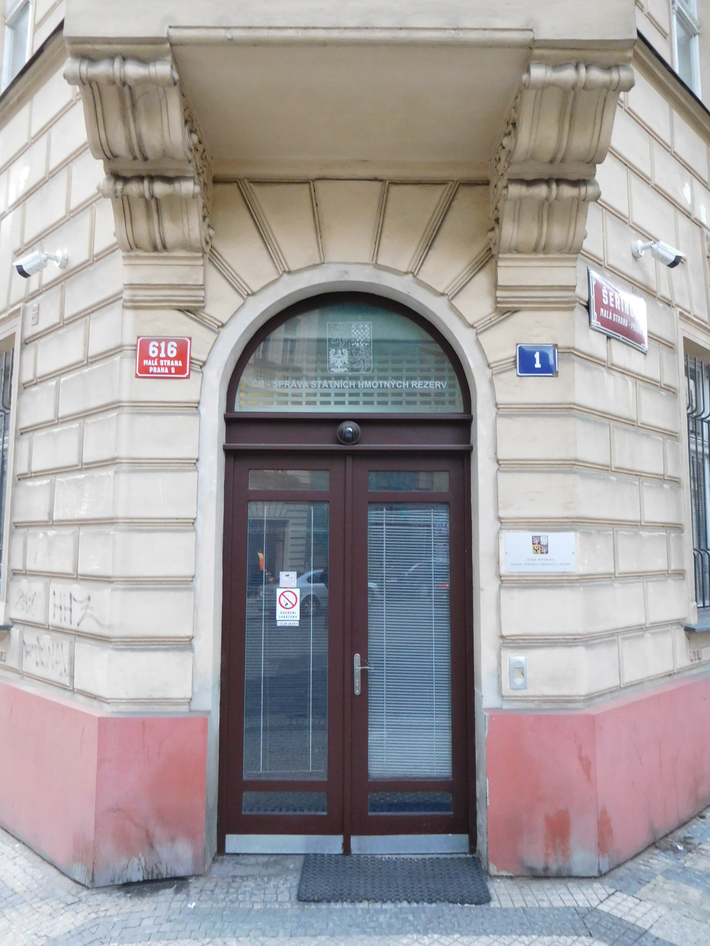 Praha - Malá Strana, Šeříková 1 - Správa státních hmotných rezerv